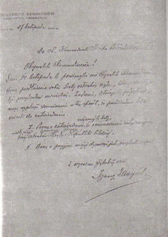 Rezygnacja Ignacego Daszyńskiego (1866-1936) ze stanowiska premiera, wysłana do Józefa Piłsudskiego.